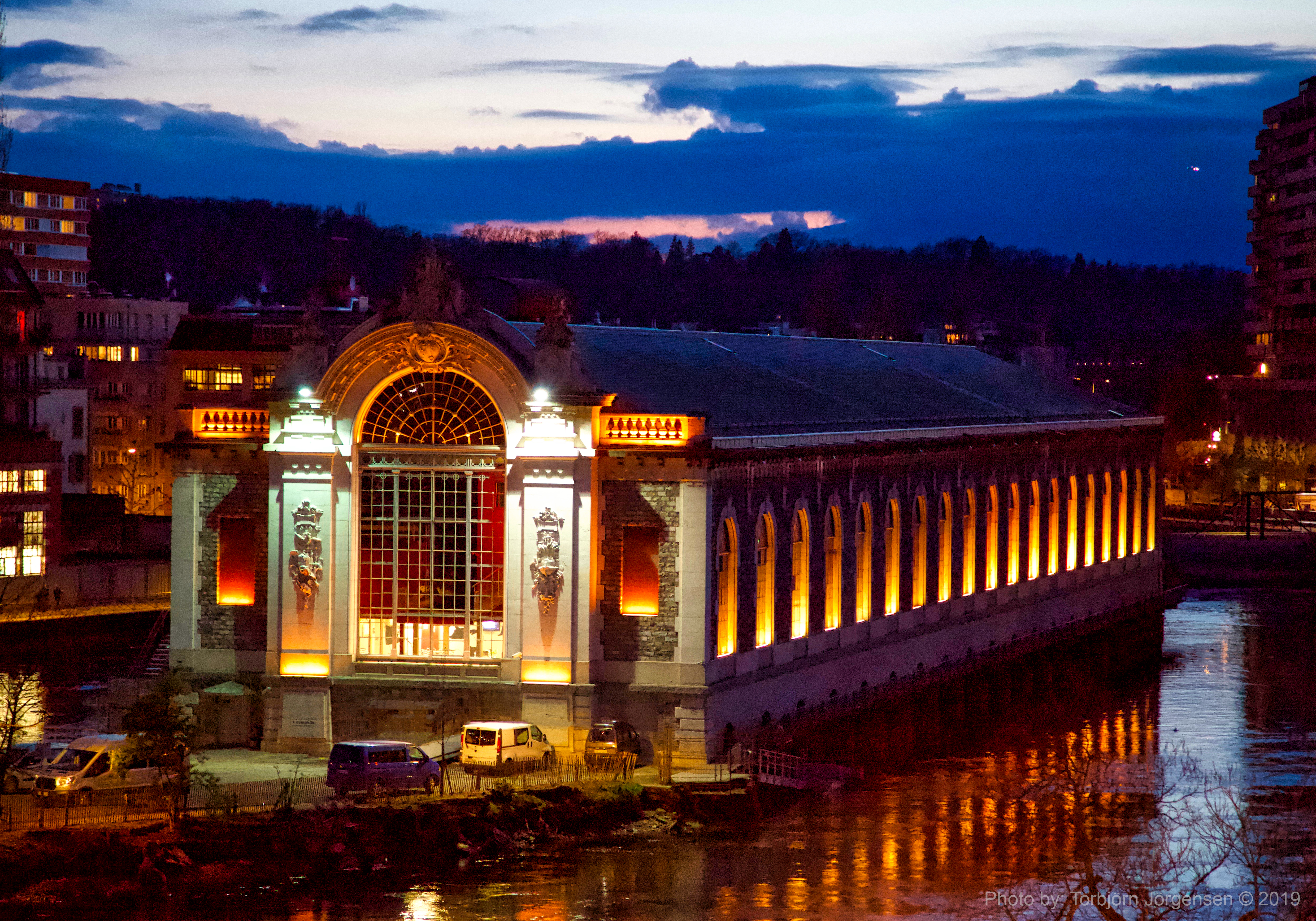 Bâtiment des Forces Motrices, Geneva